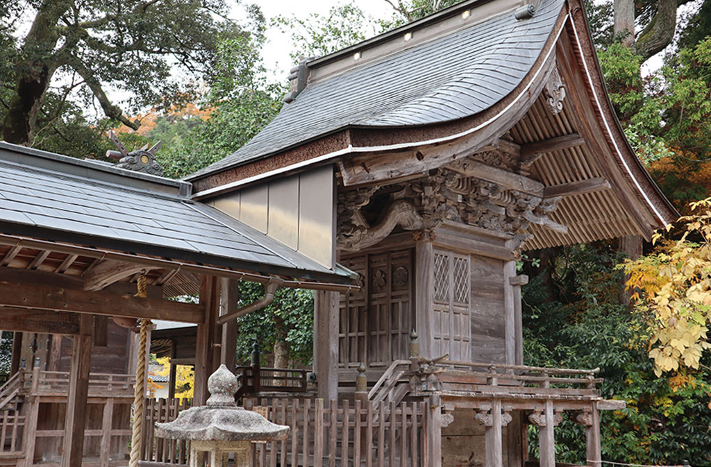 山王宮日吉神社の末社・恵比寿神社